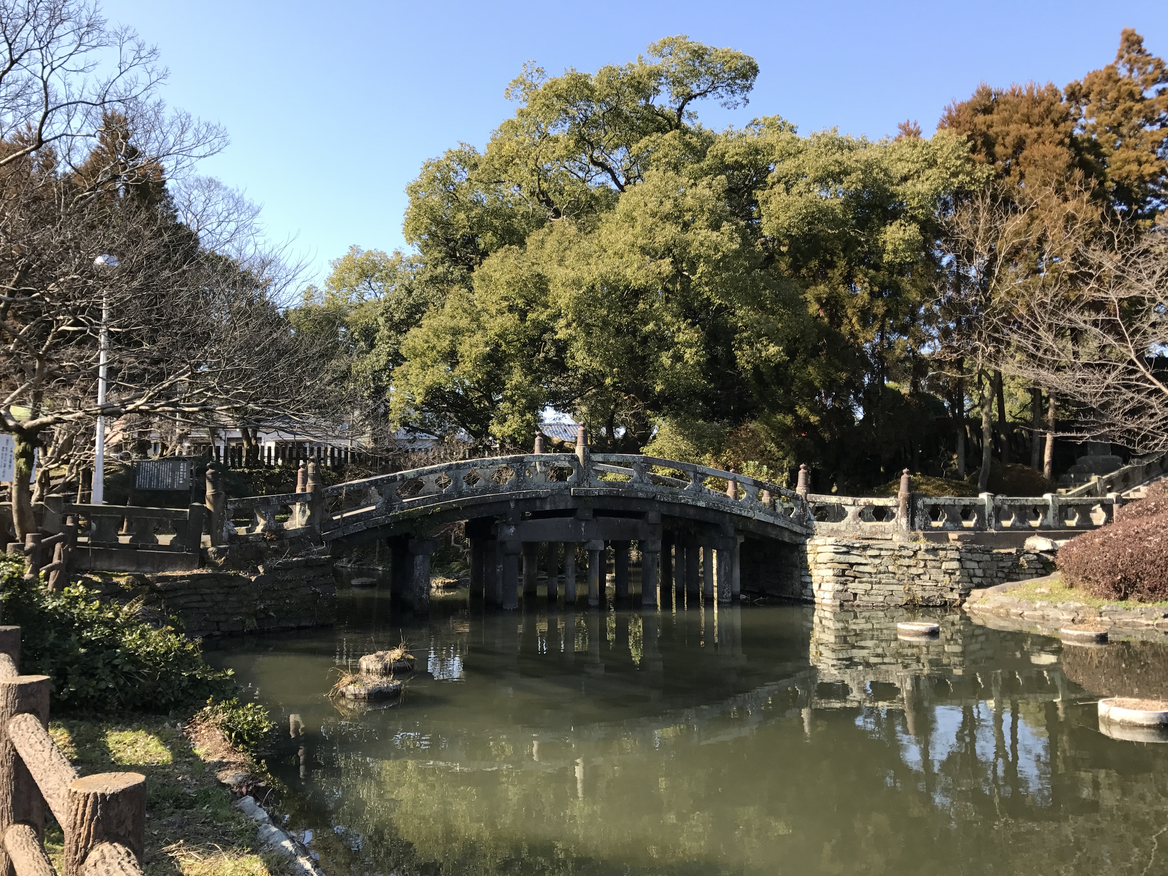 五穀神社の神橋